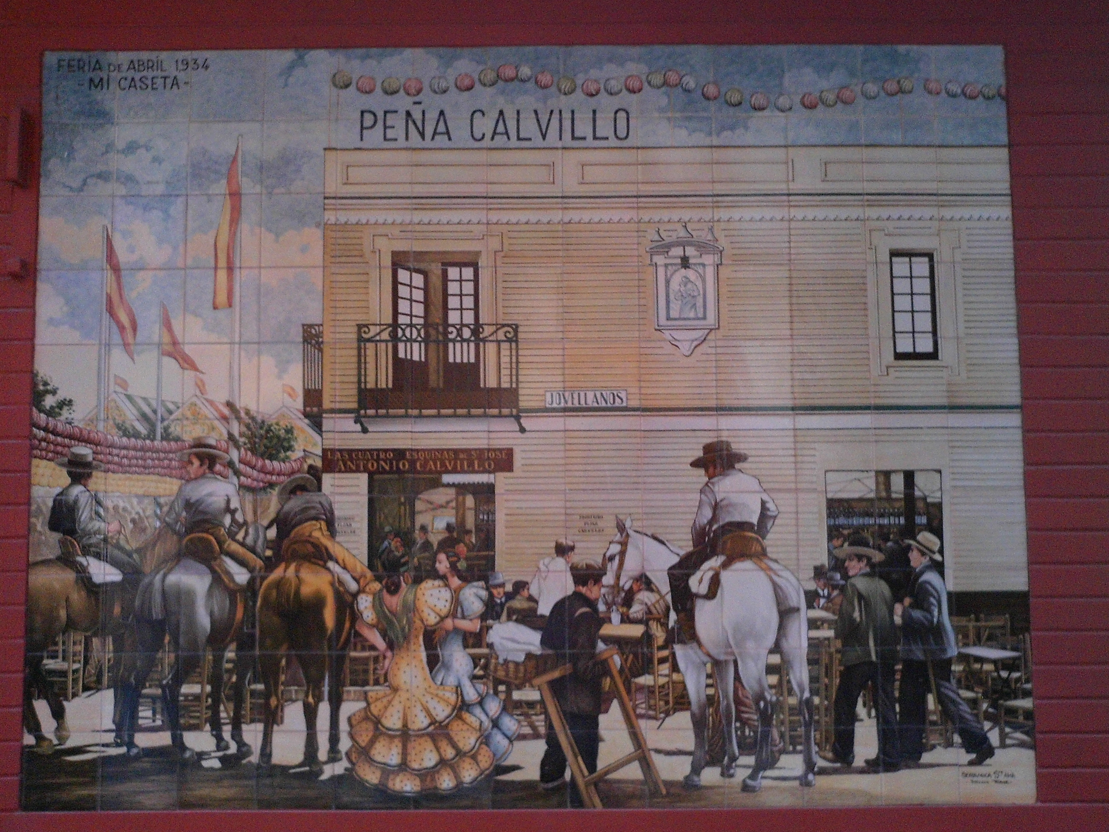 Mural de azulejos con el bar Casa Calvillo durante la Feria de Abril. Sevilla, Andalucía, España.